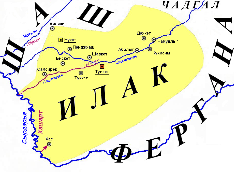 Карта Илака с указанием сопредельных территорий. Составлена по материалам книги Масон М. Е. Ахангеран. Археолого-топографический очерк. – Ташкент, 1953. с. 33.и карты Илака в Государственном музее истории Узбекистана.